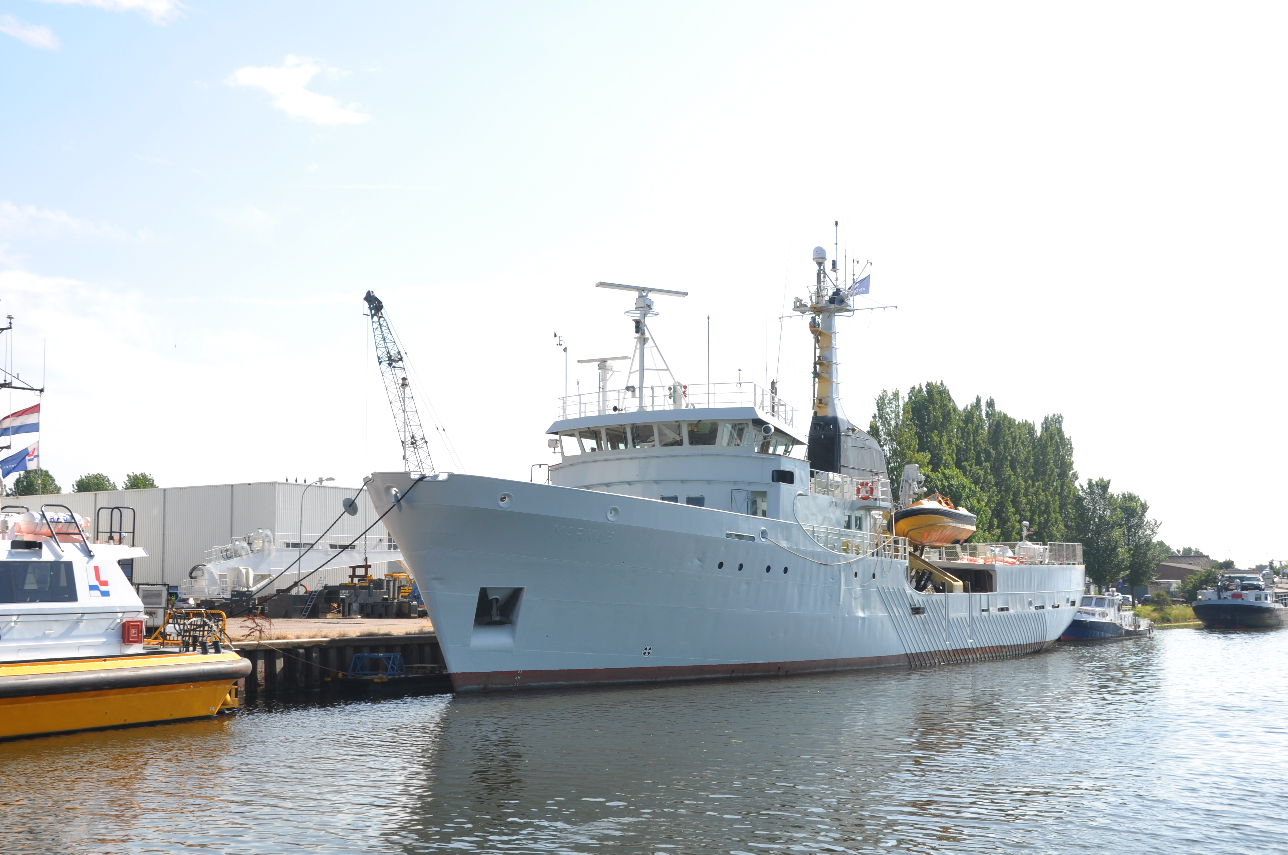 De MARKAB op het Kanaal door Walcheren.